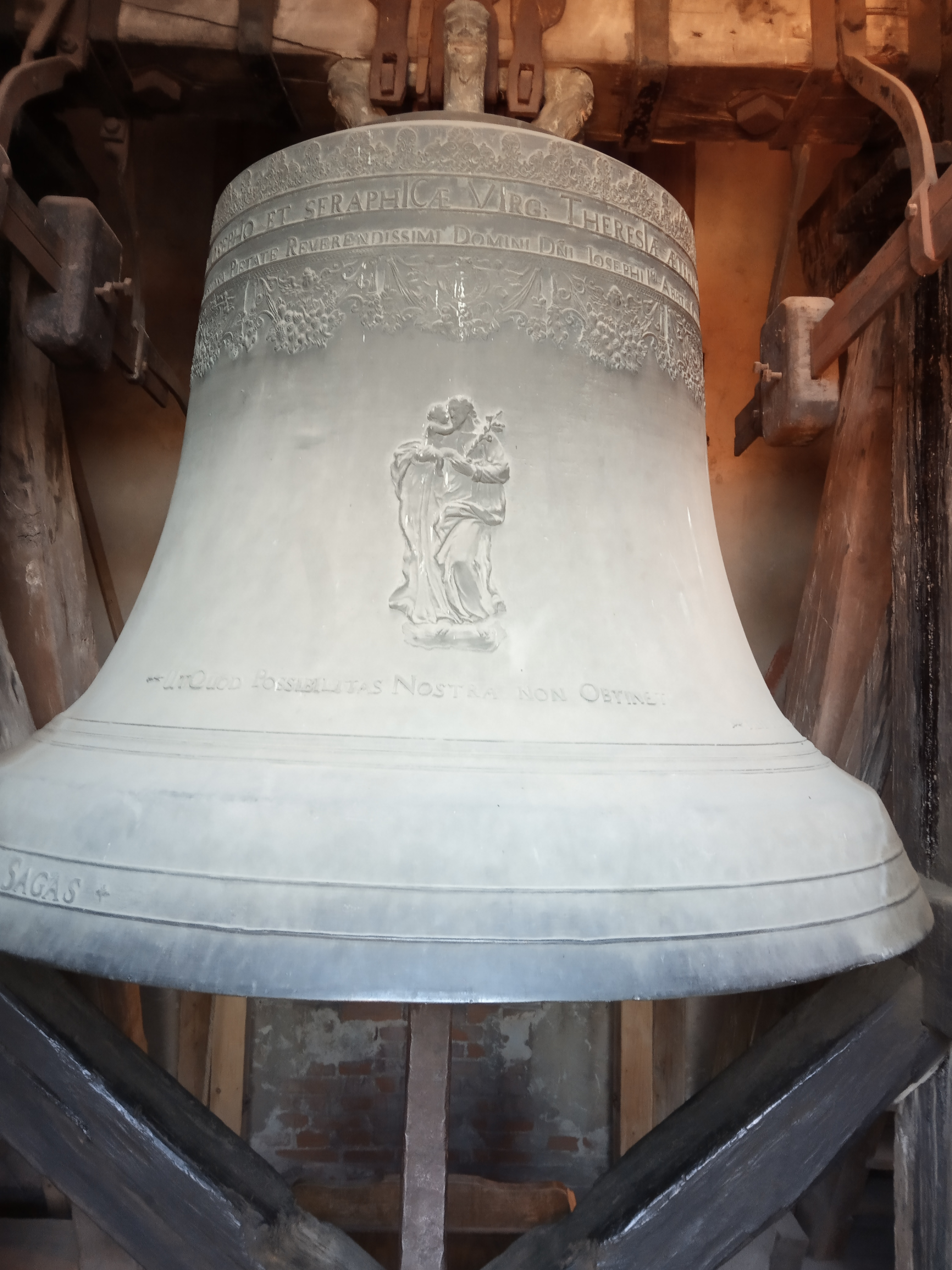 Zvon sv. Josef, váží 5,3 tun